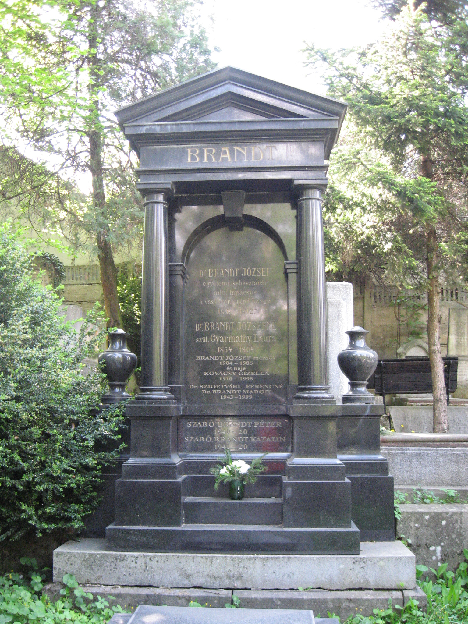 Brandt József sírja a kolozsvári Házsongárdi temetőben.